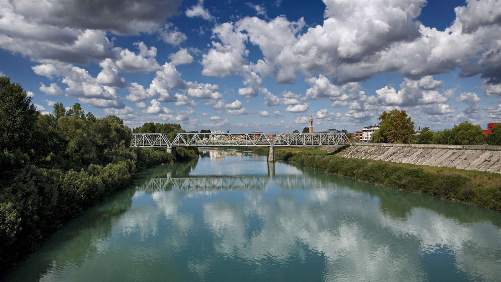 Foto del fiume Tagliamento che scorre presso la città di Latisana, con il ponte della ferrovia